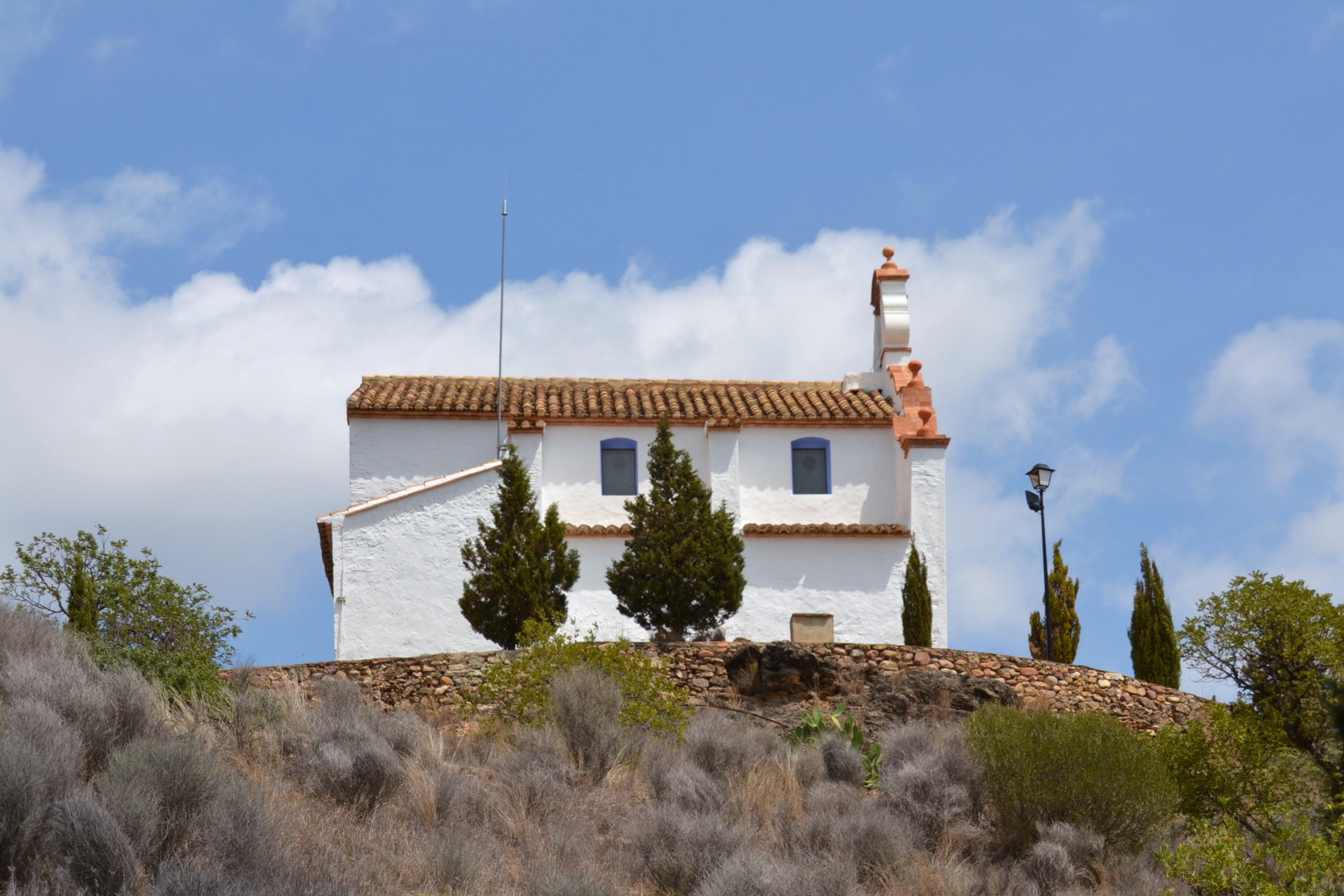 Vista lateral de l'ermita de la mare de Déu dels Afligits d'Alfara de la Baronia.